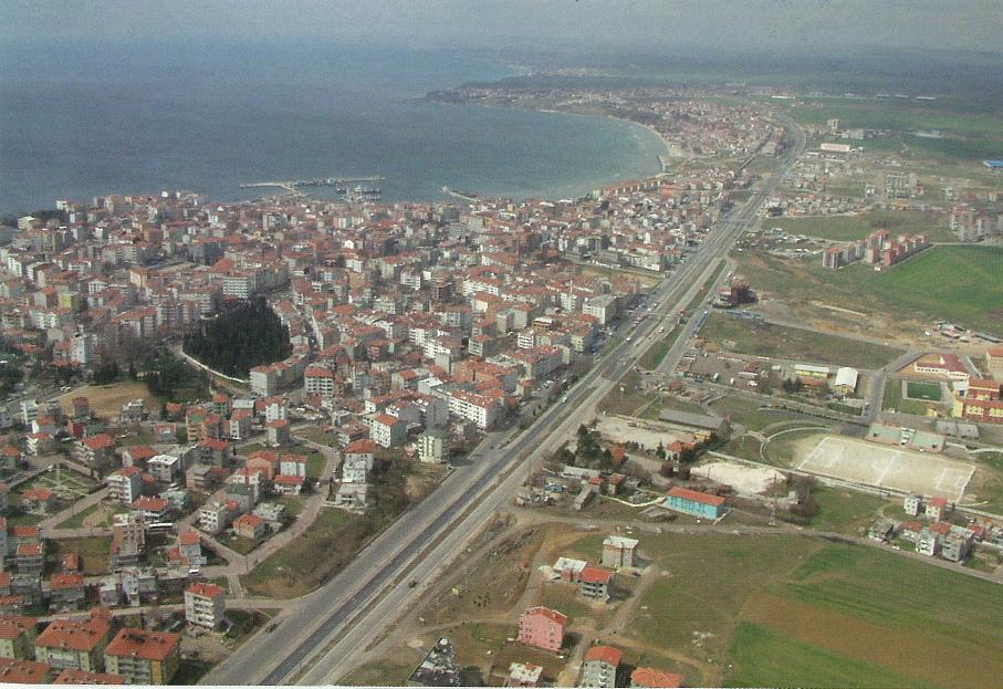 Silivri